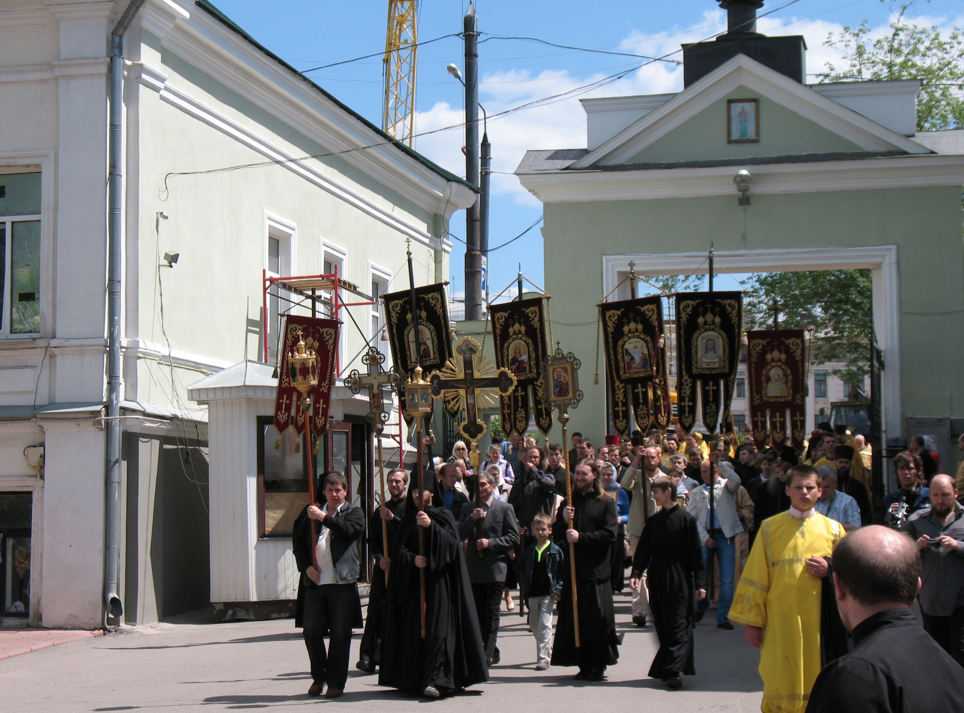 Крестный ход от Благовещенского собора 27 мая 2012 года в честь 20-летия Харьковского собора. На хоругвях видна главная святыня Солобожанщины - Озерянская икона Божией матери. Вход в монастырь.